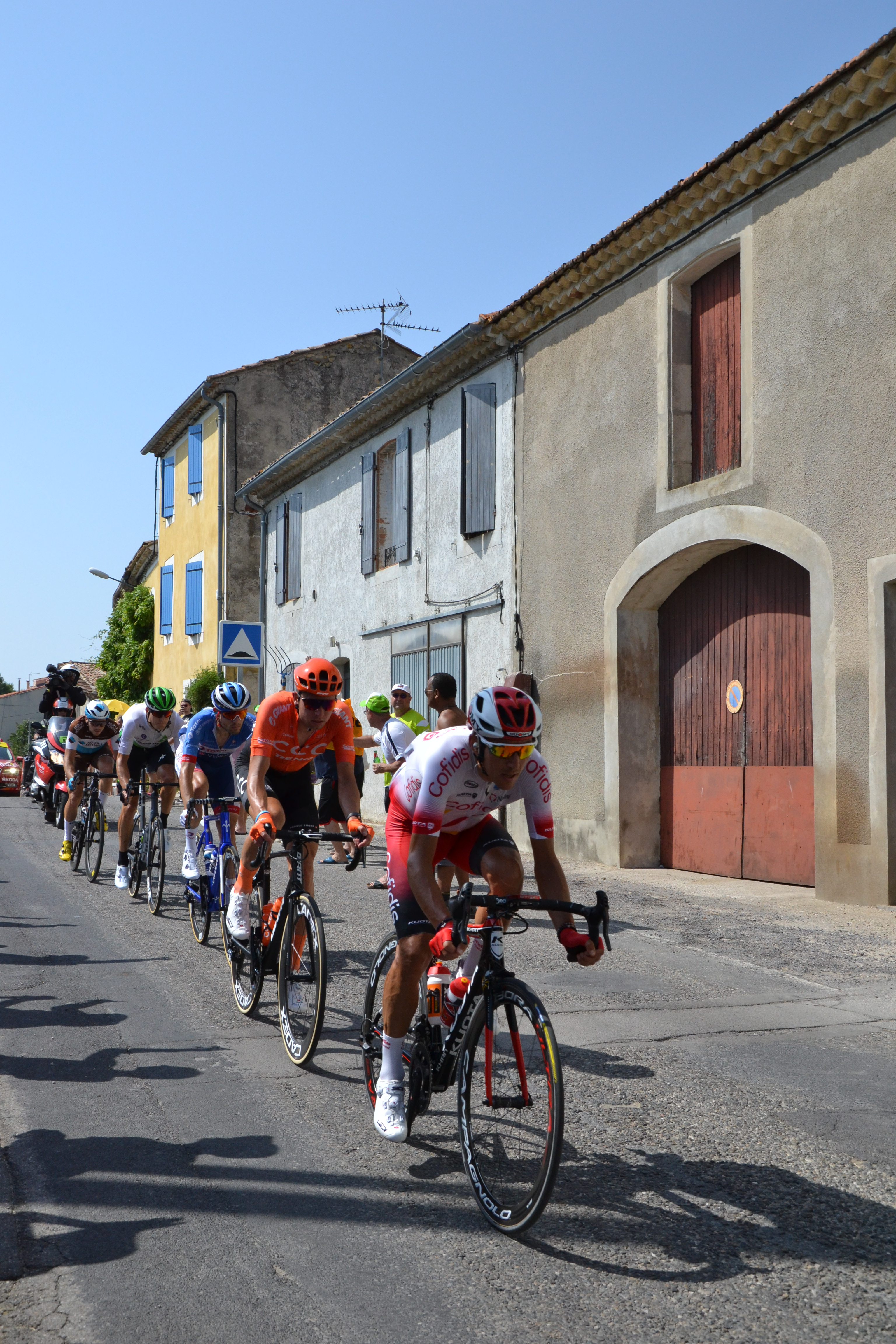 Tour de France 2019 étape 16 passage de l'échappée à Lédignan à environ 60 km de l'arrivée.